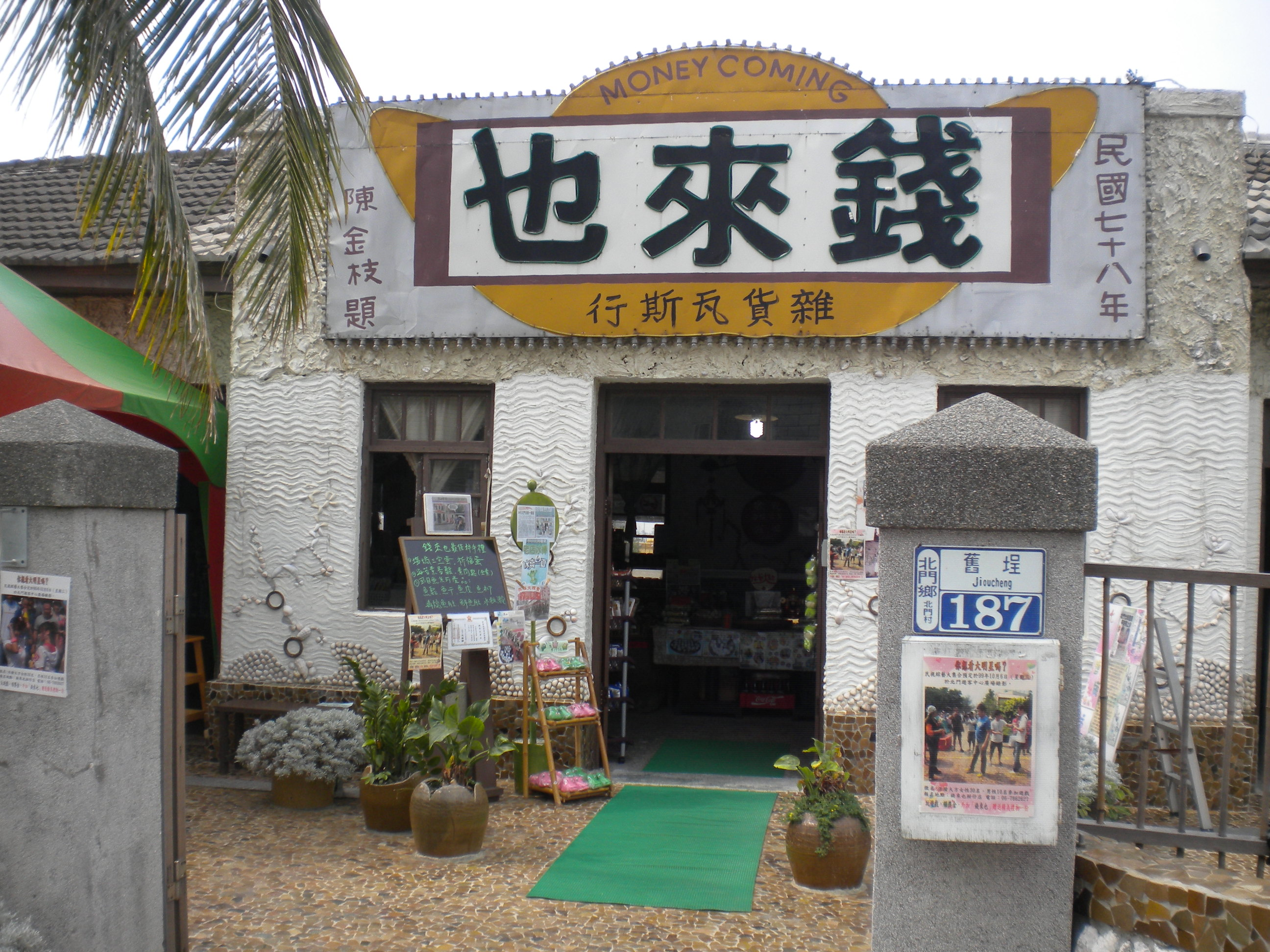 偶像劇《王子變青蛙》的拍攝場景錢來也雜貨店，地址：臺南市北門區舊埕187號。